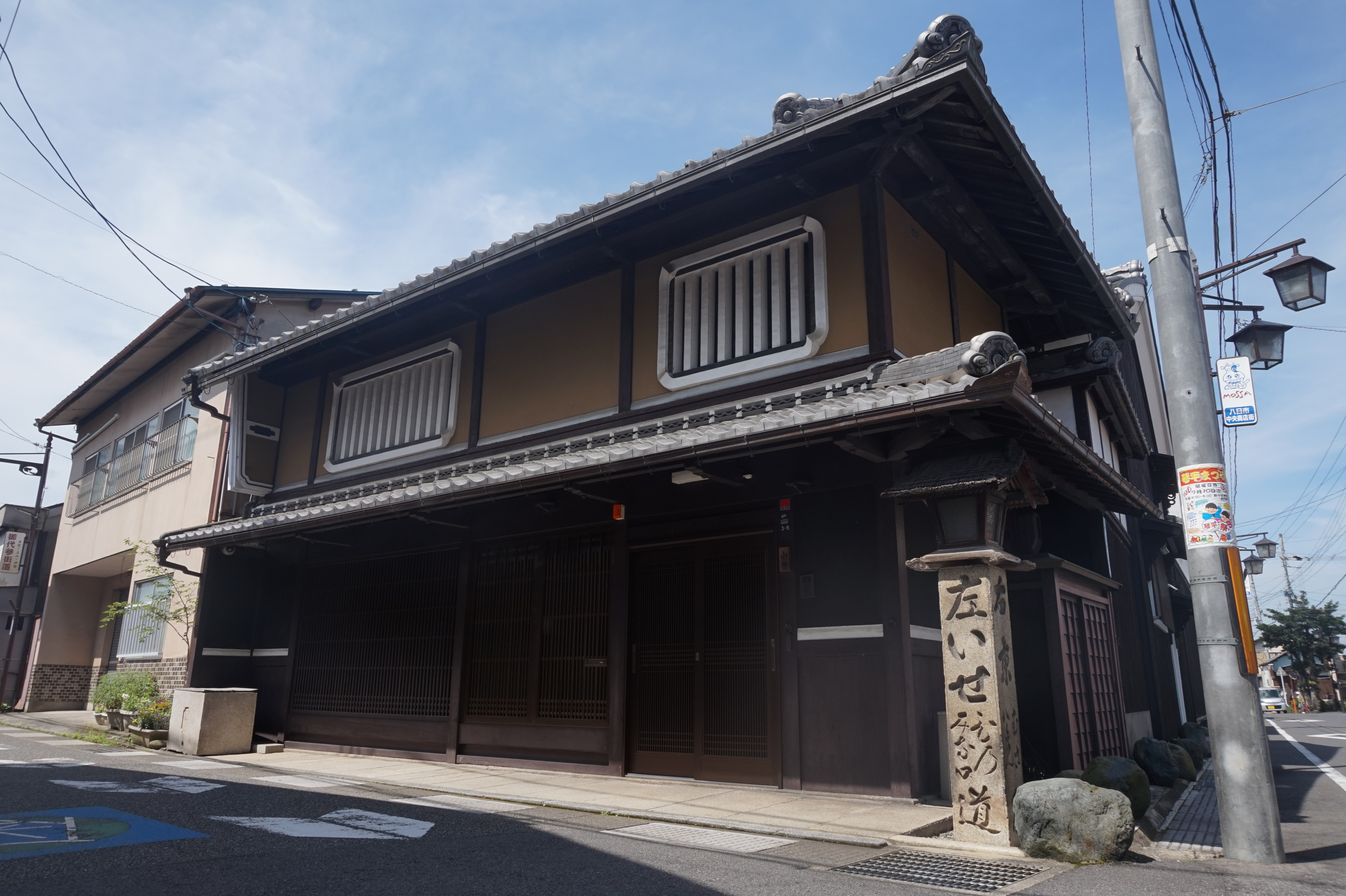 滋賀県東近江市八日市清水1丁目（栄町商店街）付近の旧御代参街道。